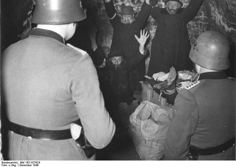 Polen, Ghetto Lublin, Polizei-Einsatz Zentralbild, II. Weltkrieg 1939-45 Im besetzten Polen, Dezember 1940. In verschiedenen Städten, unter anderem in Lublin haben die deutschen Faschisten Ghettos eingerichtet. Im Lubliner Ghetto befinden sich bis zu 20 Metern unter der Erde Gänge und Gewölbe. Hier haben die Juden ihre letzte Habe versteckt. Die deutsche Polizei ist bemüht, ihrer habhaft zu werden. UBz: Die Polizei, geführt von einem Verräter, verhaftet in einem Gewölbe Juden mit ihren Vorräten. 120-46